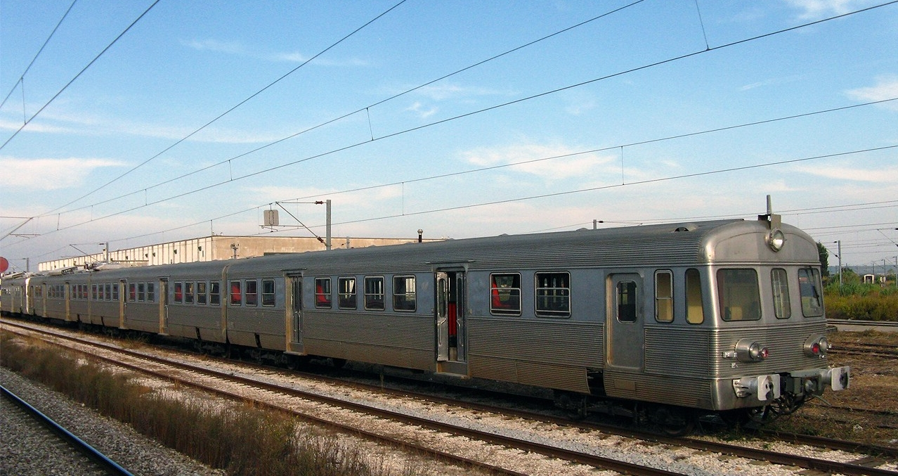 CP UTE's 2000 parqueadas no Entroncamento. Destino: Argentina